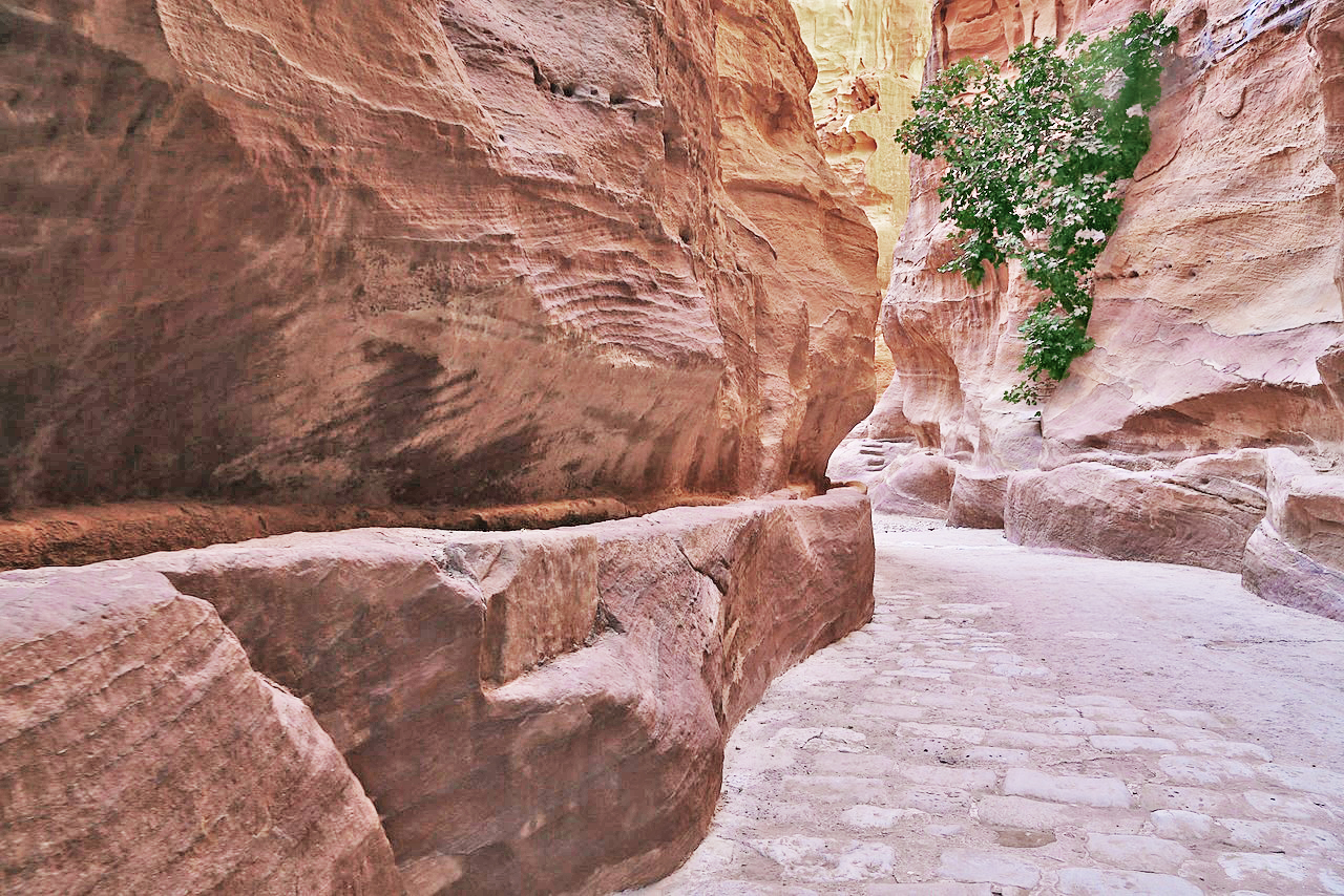 Le Siq et ses canaux de chaque coté de la montagne.